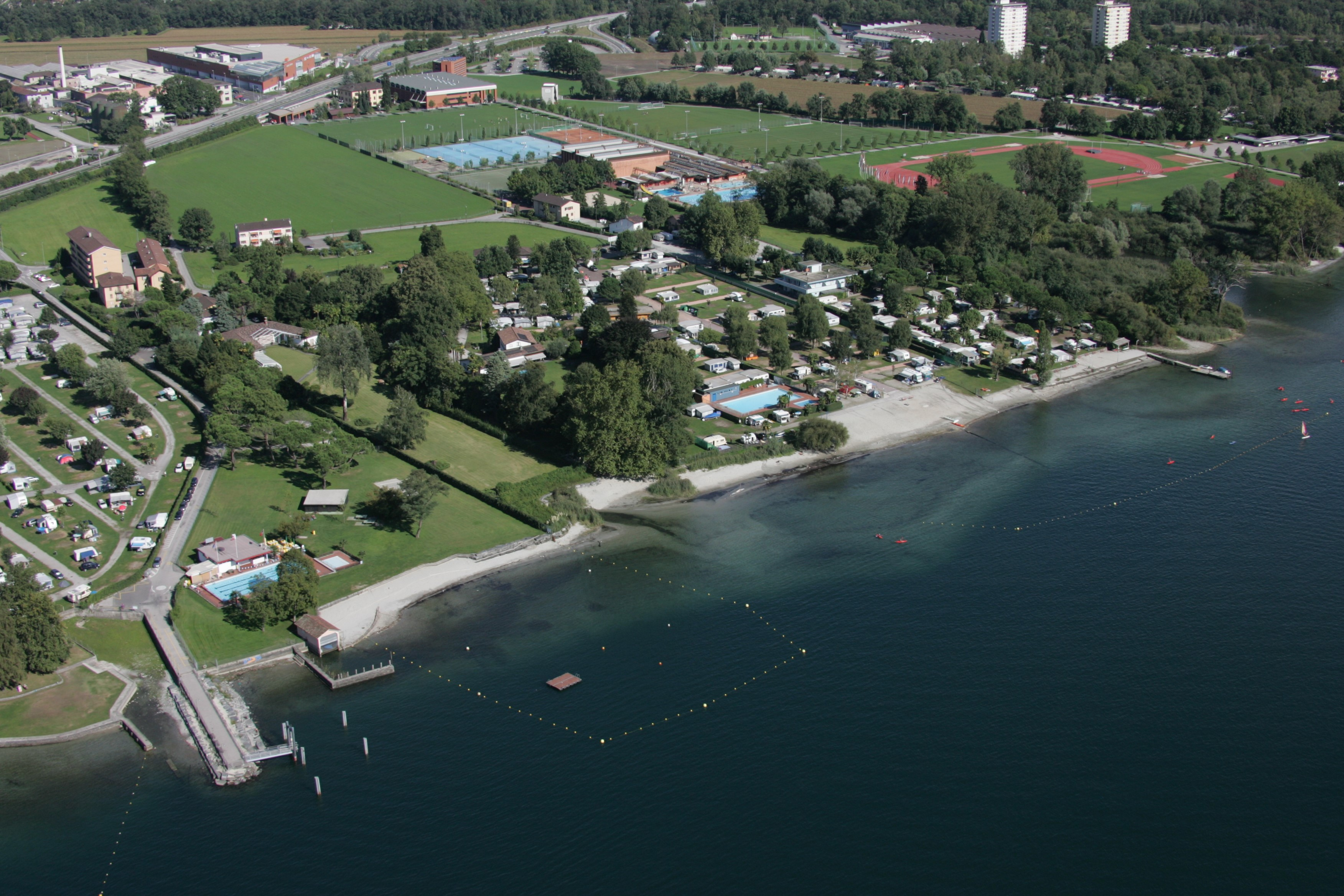 Das Natioale Jugendsportzentrum Tenero CST in einer Luftaufnahme.